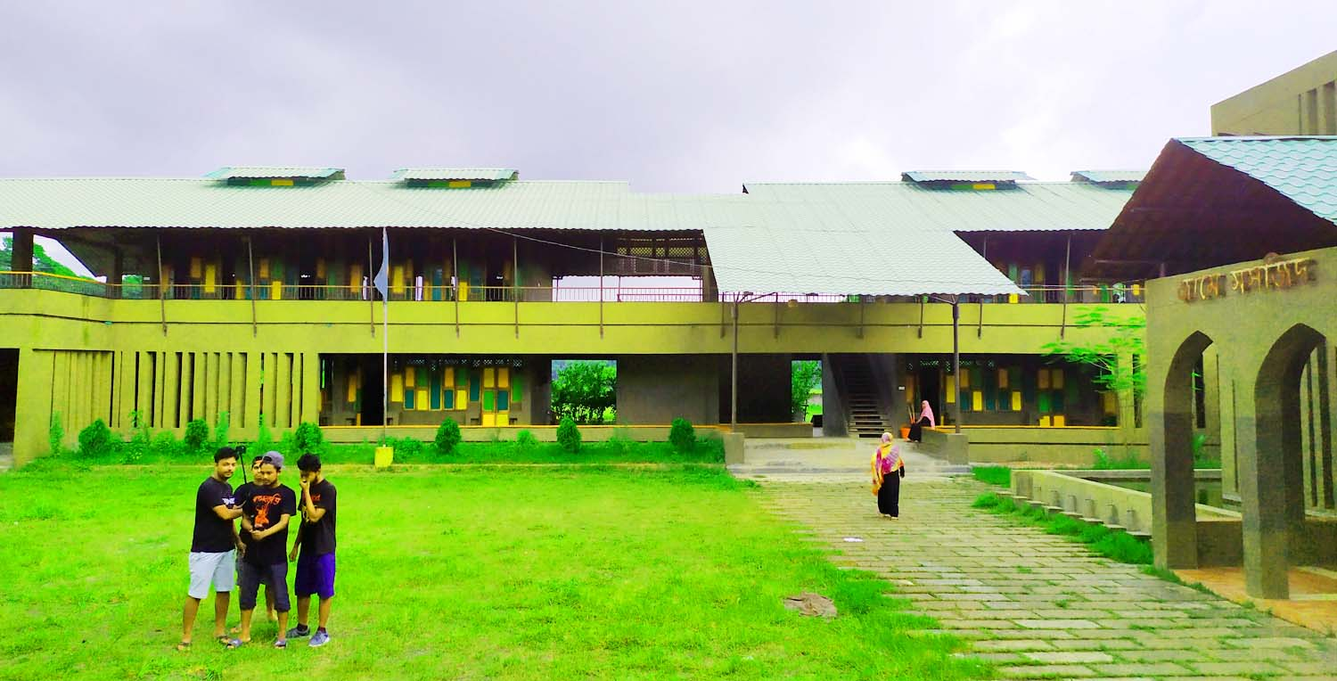 চাঁদপুর সদর উপজেলার লক্ষ্মীপুর গ্রামে অবস্থিত নান্দনিক সৌন্দর্য্যে শাহাবুদ্দিন স্কুল এন্ড কলেজ